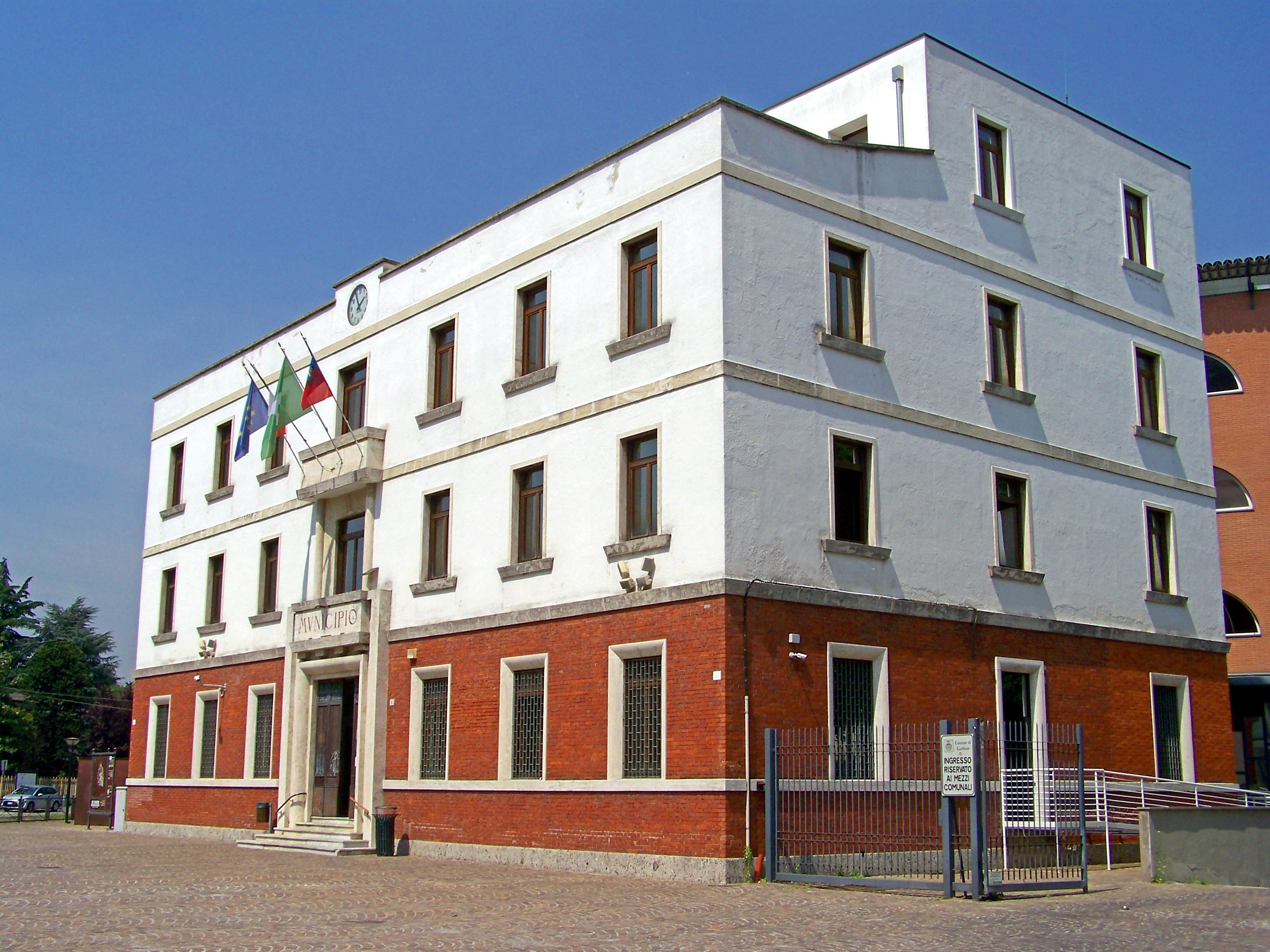 La facciata d'ingresso del vecchio municipio di Limbiate